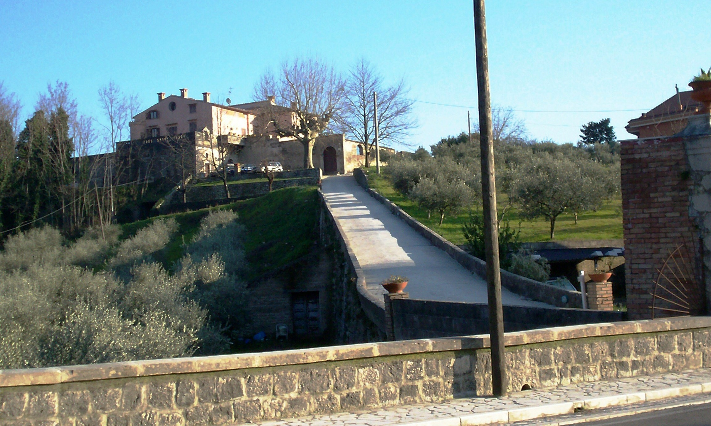 Villa Langer in Cerreto Sannita vista dalla strada provinciale Cerreto-Telese